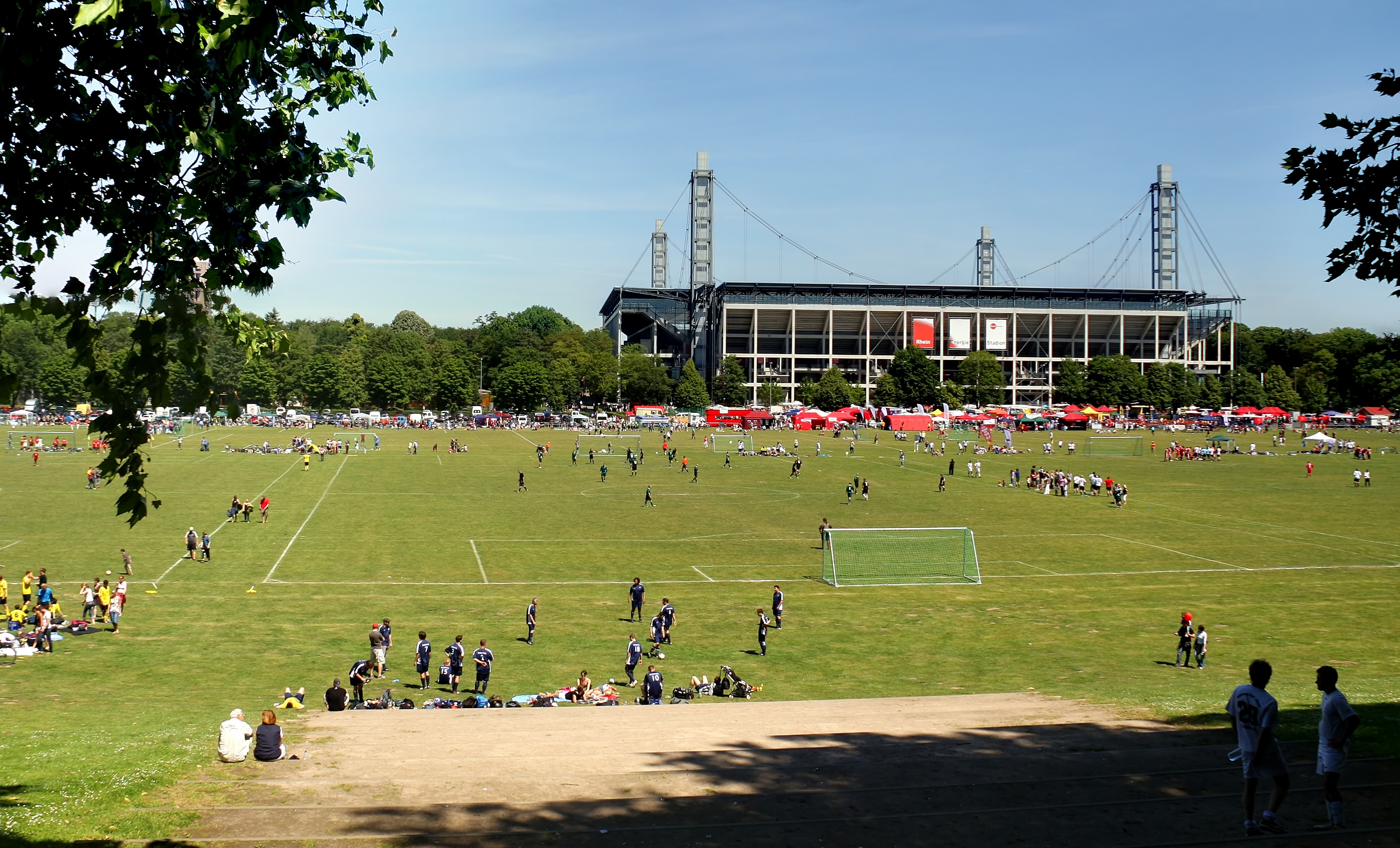 Rheinenergie-Stadion, Südseite. Im Vordergrund Fußballspieler auf der Jahnwiese im Rahmen des „Come-Together-Cup“ 2011.